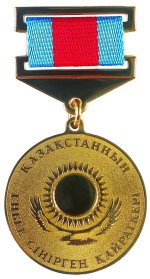 Нагрудный знак к Почётному званию "Заслуженный деятель Казахстана"